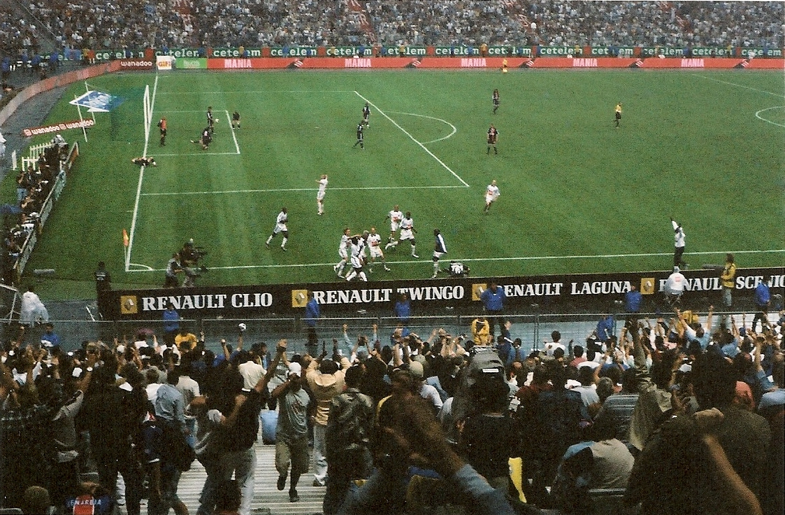 Finale de la coupe de France de football 2003 AJA-PSG. Joie auxerroise après le but de la victoire.